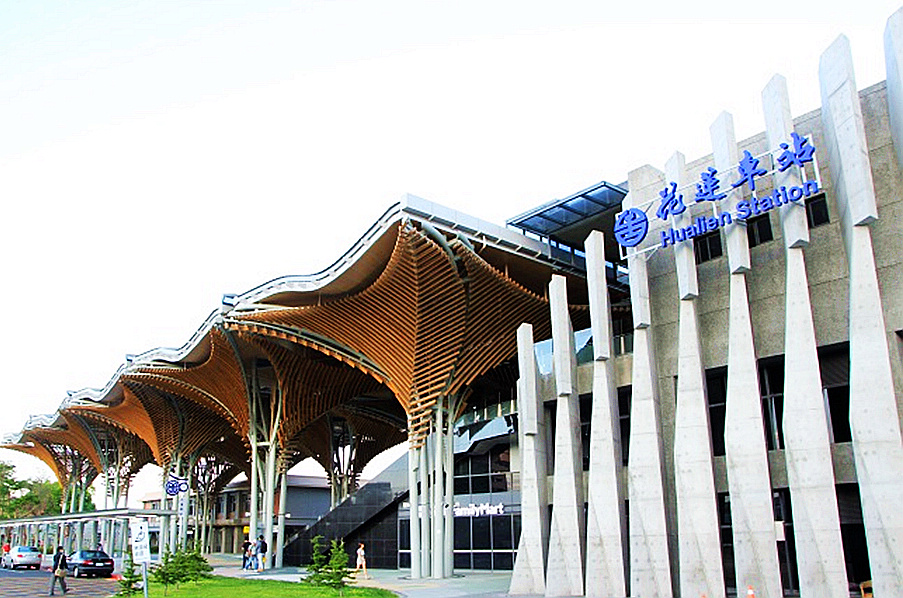 Hualien station